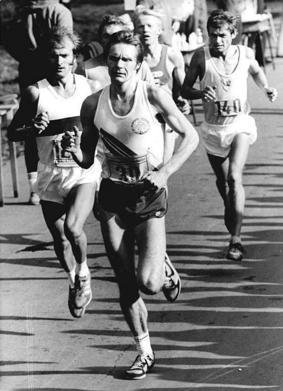 ADN-ZB Thieme 3.5.80 Karl-Marx-Stadt: 13. Internationaler Marathonlauf. Fast 30 Kilometer lief diese Spitzengruppe zusammen. Von links: Waldemar Cierpinski (1.Platz), Øyvind Dal (Norwegen, 2. Platz); dahinter Jouni Kortelainen (Finnland, 4. Platz) und Joachim Truppel (3. Platz).